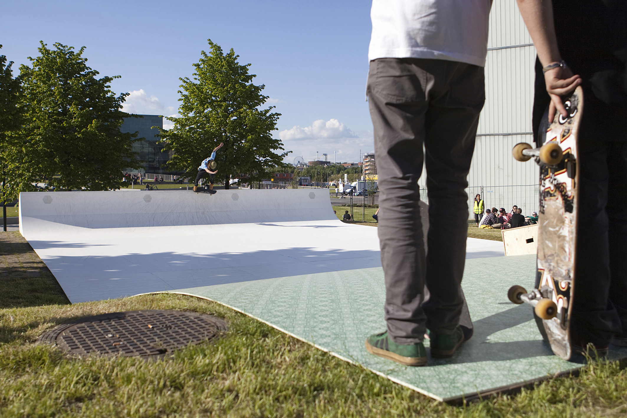 URB 12 -festivaalin skeitattava teos Surfing the Apocalypse.